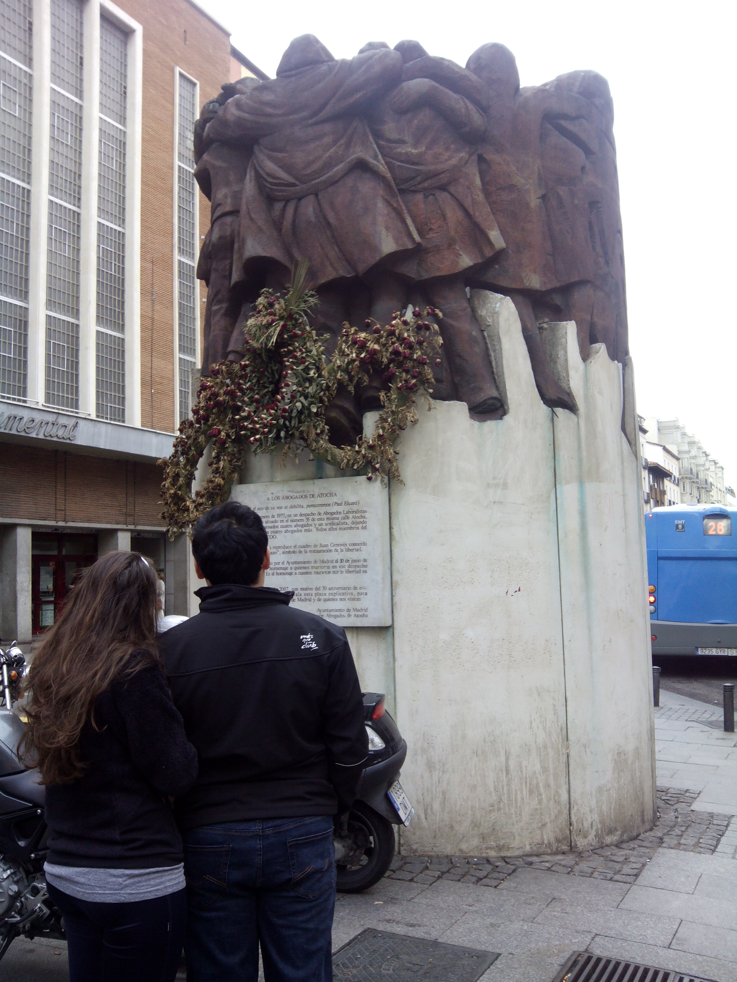 Monumento a los Abogados de Atocha.